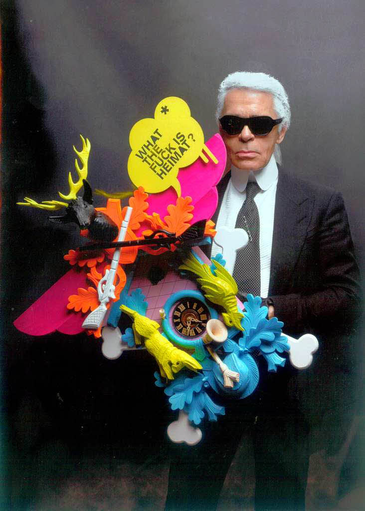 KarL Laqgerfeld mit einer Kuckuksuhr von Stefan Strumbel